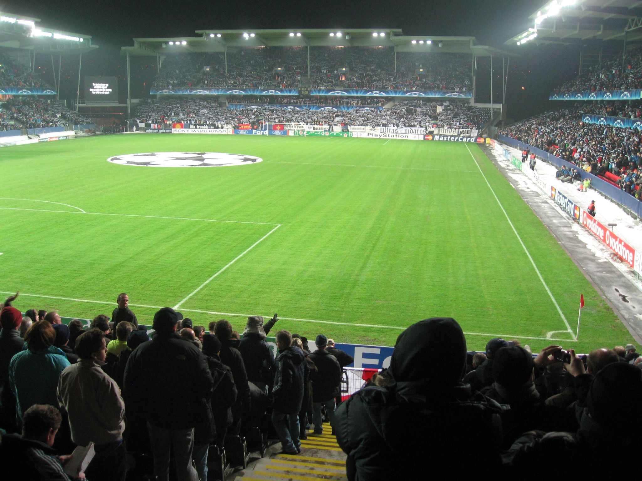 rosenborg (0) v CHELSEA (4) - 28/11/07